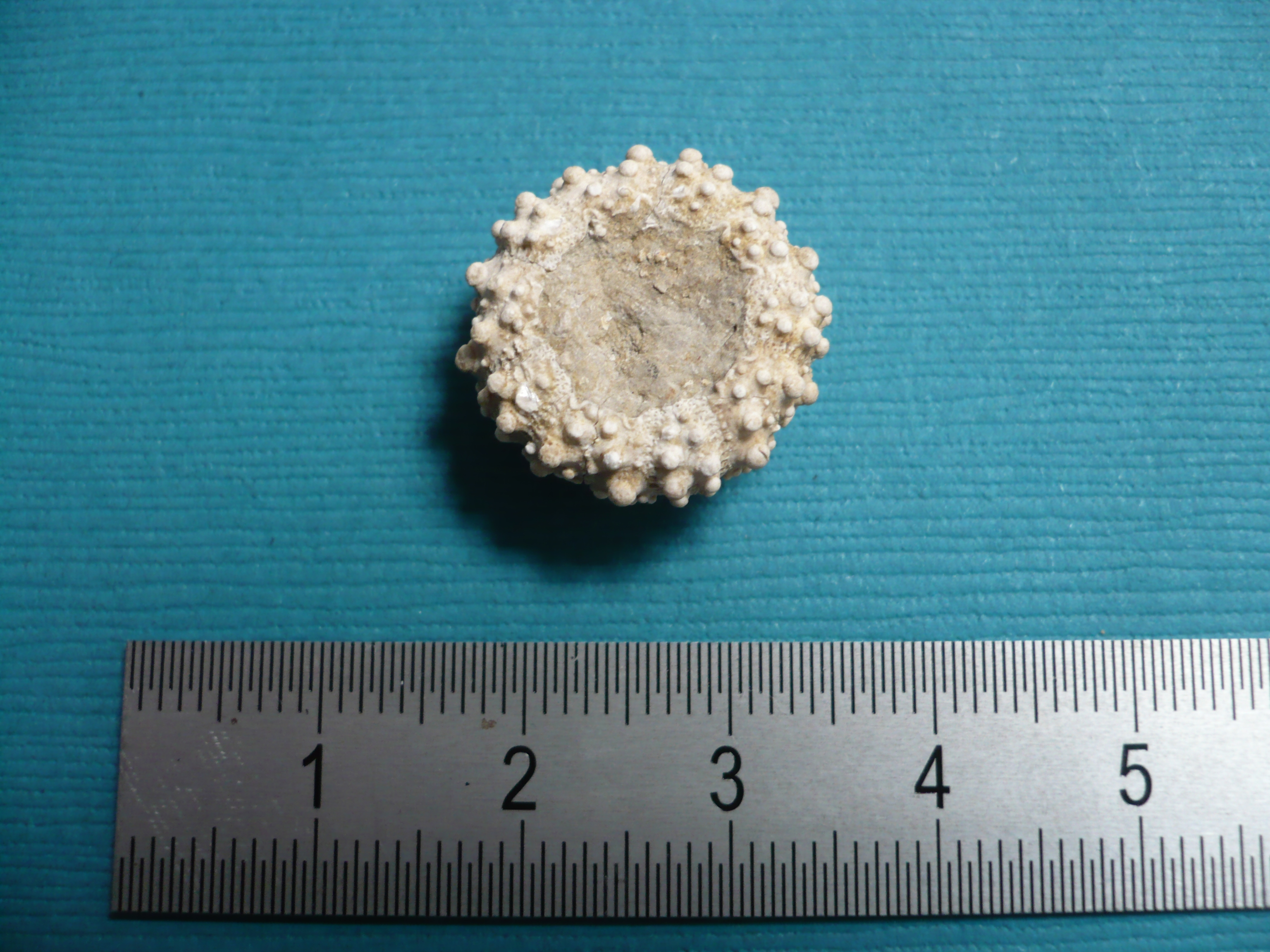 Glypticus hieroglyphicus à Charmes-la-Côte (54113, Meurthe-et-Moselle, Lorraine, France). Vue orale.